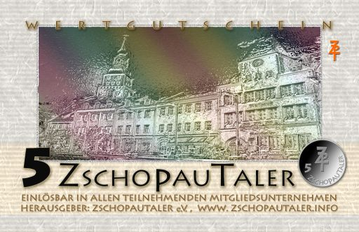 5 Zschopautaler